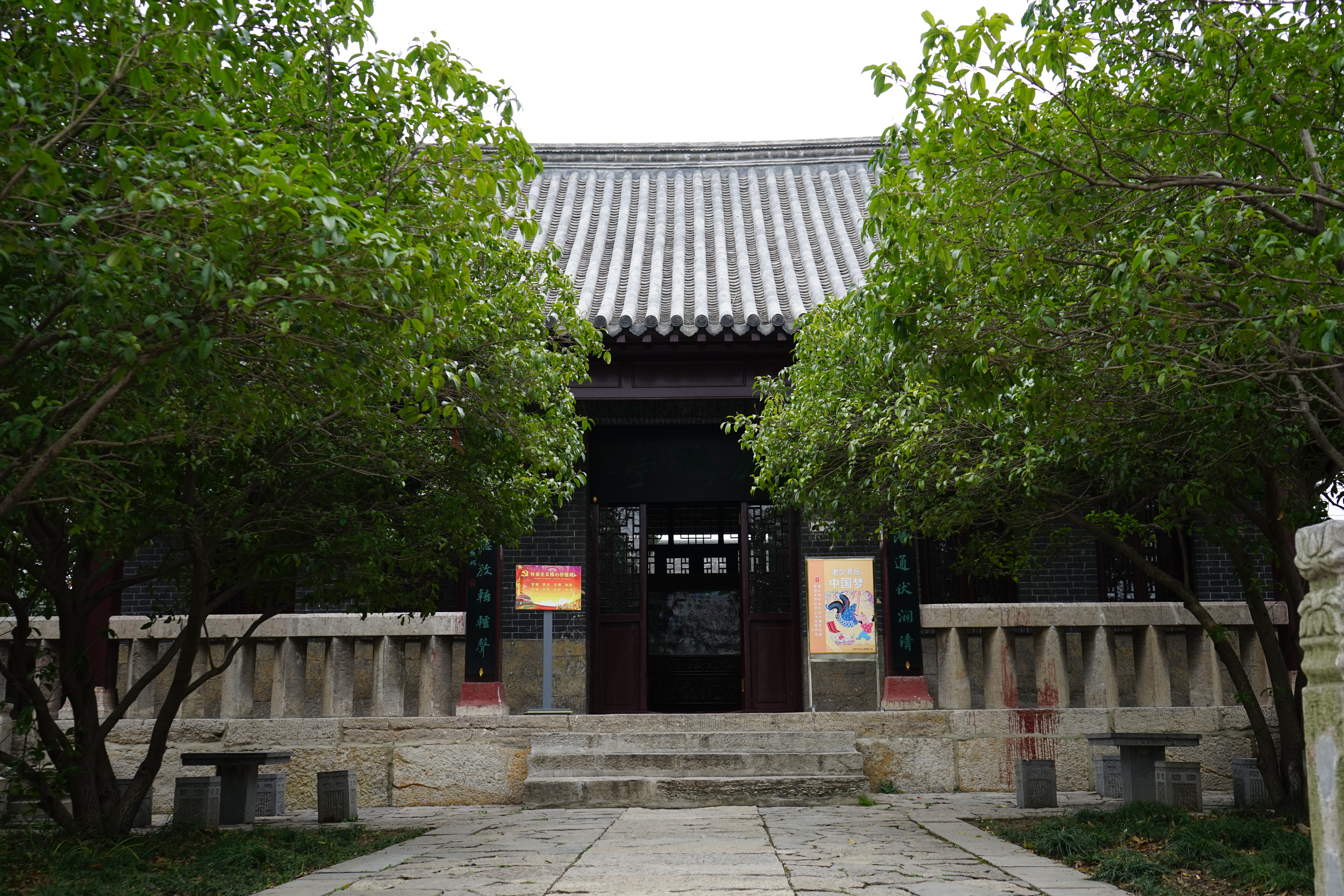 云龙山 放鹤亭